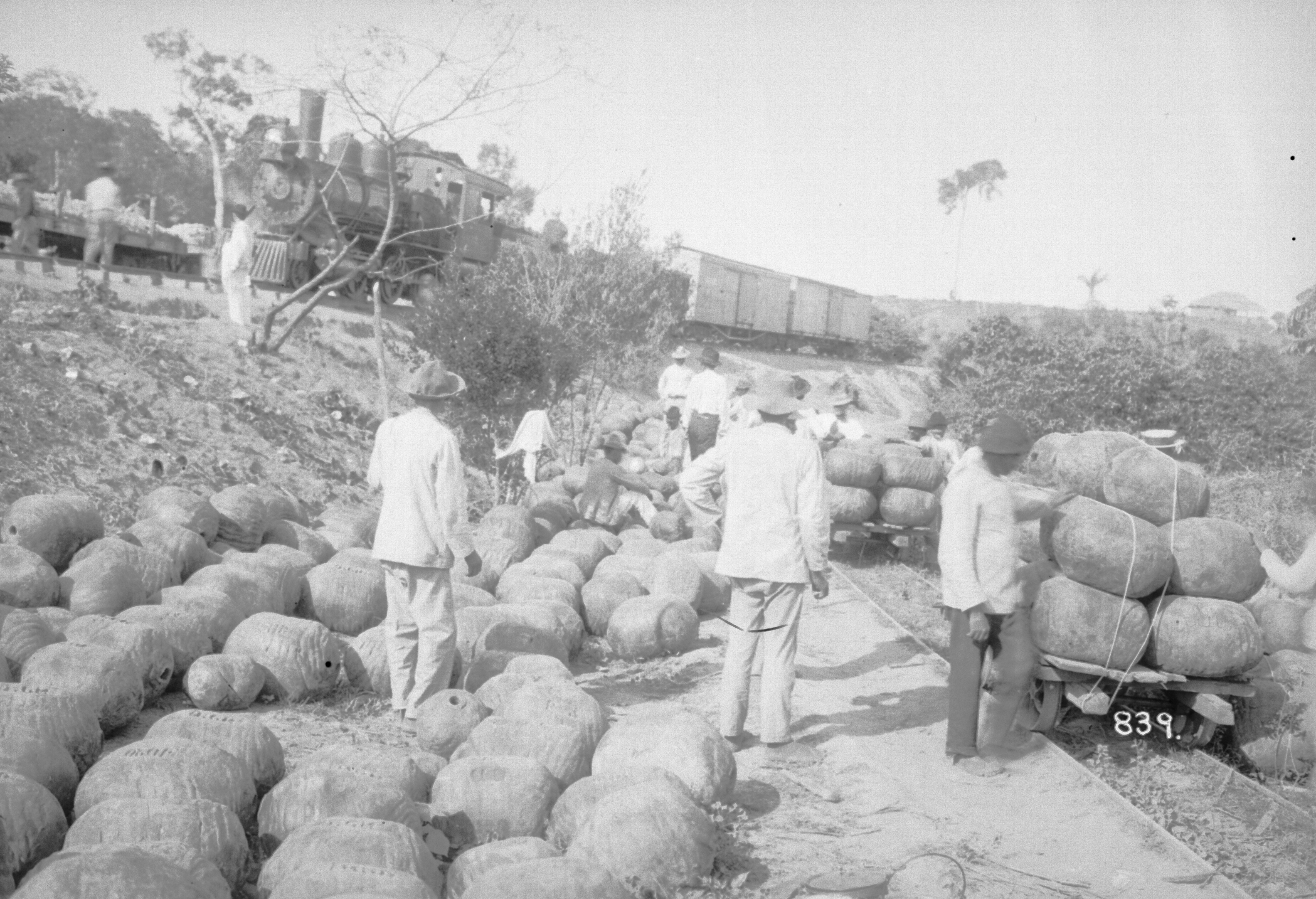 Obra que integra o acervo do Museu Paulista da USP. Coleção Dana Merrill.